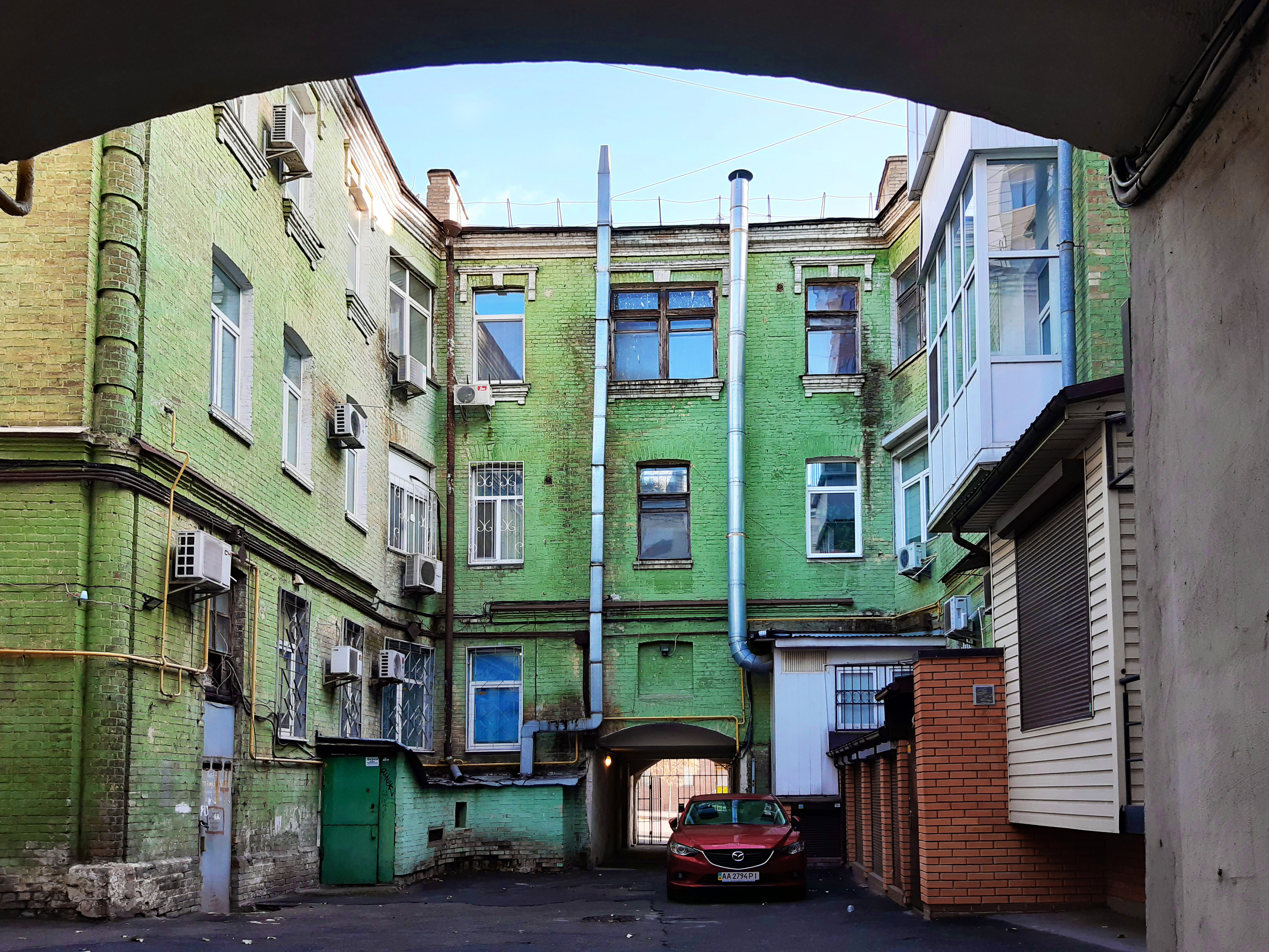 Подвір'я. Жилий будинок, Київ, вул. Антоновича, 32